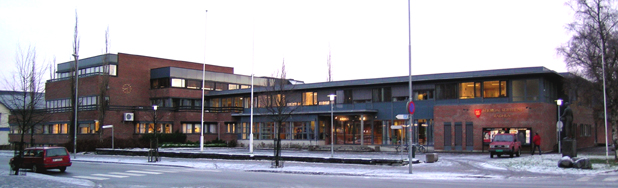 Stjørdal town hall.